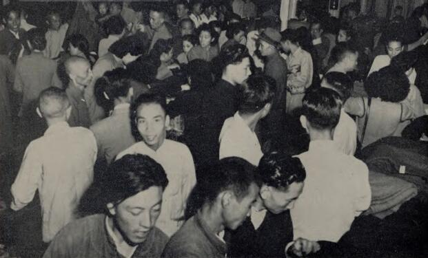 题名： 经济动荡中的上海:为了贯彻经济改革,国府特派蒋经国到上海区督导一切,实行“打虎”但一般人民则为了物价暗涨,展开抢购潮:上海市民抢购布匹情形:[照片] 文献来源： 《中美周报》 出版时间： 1948 年 卷期(页)： [ 第308期 ，1页 ] 中图分类号： D829.712